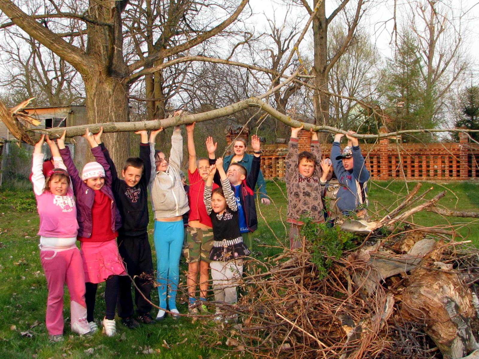 Wojcieszyce. Sprzątanie wsi.